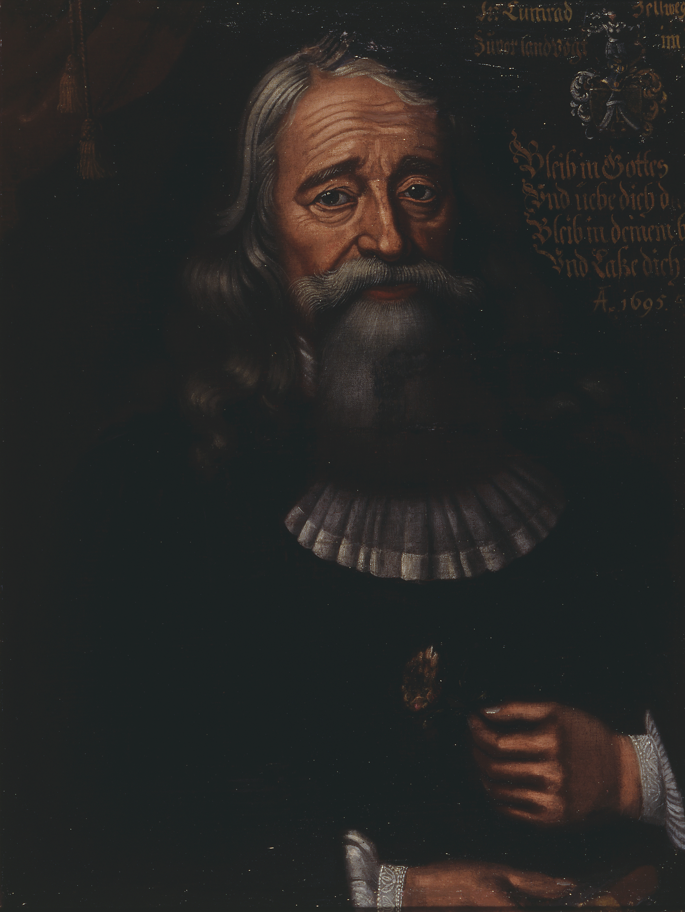 13. Landammann von Appenzell Ausserrhoden, Brustbildnis